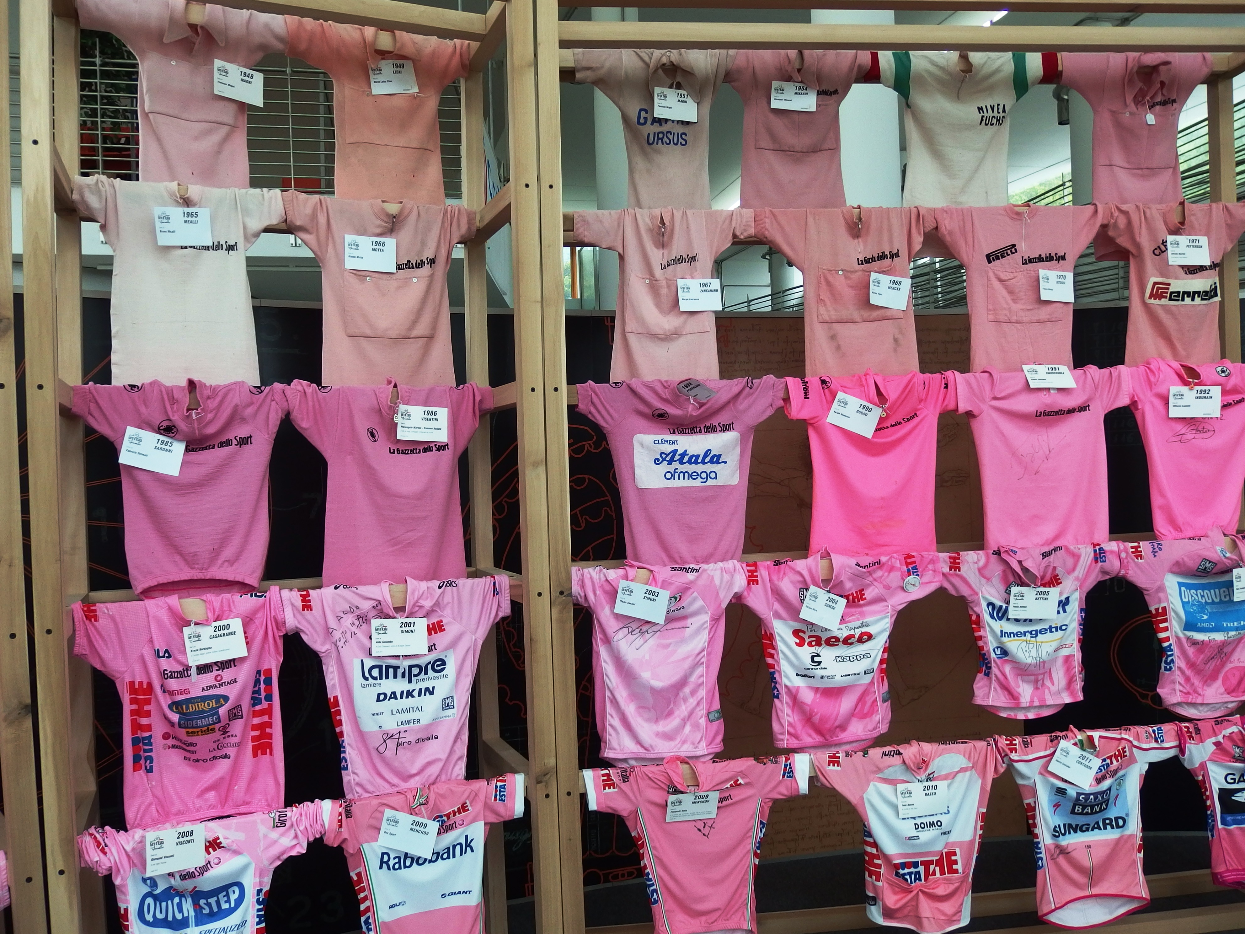 Maglie Rose im Museo del Ciclismo Madonna del Ghisallo in Magreglio, Comer See, Italien